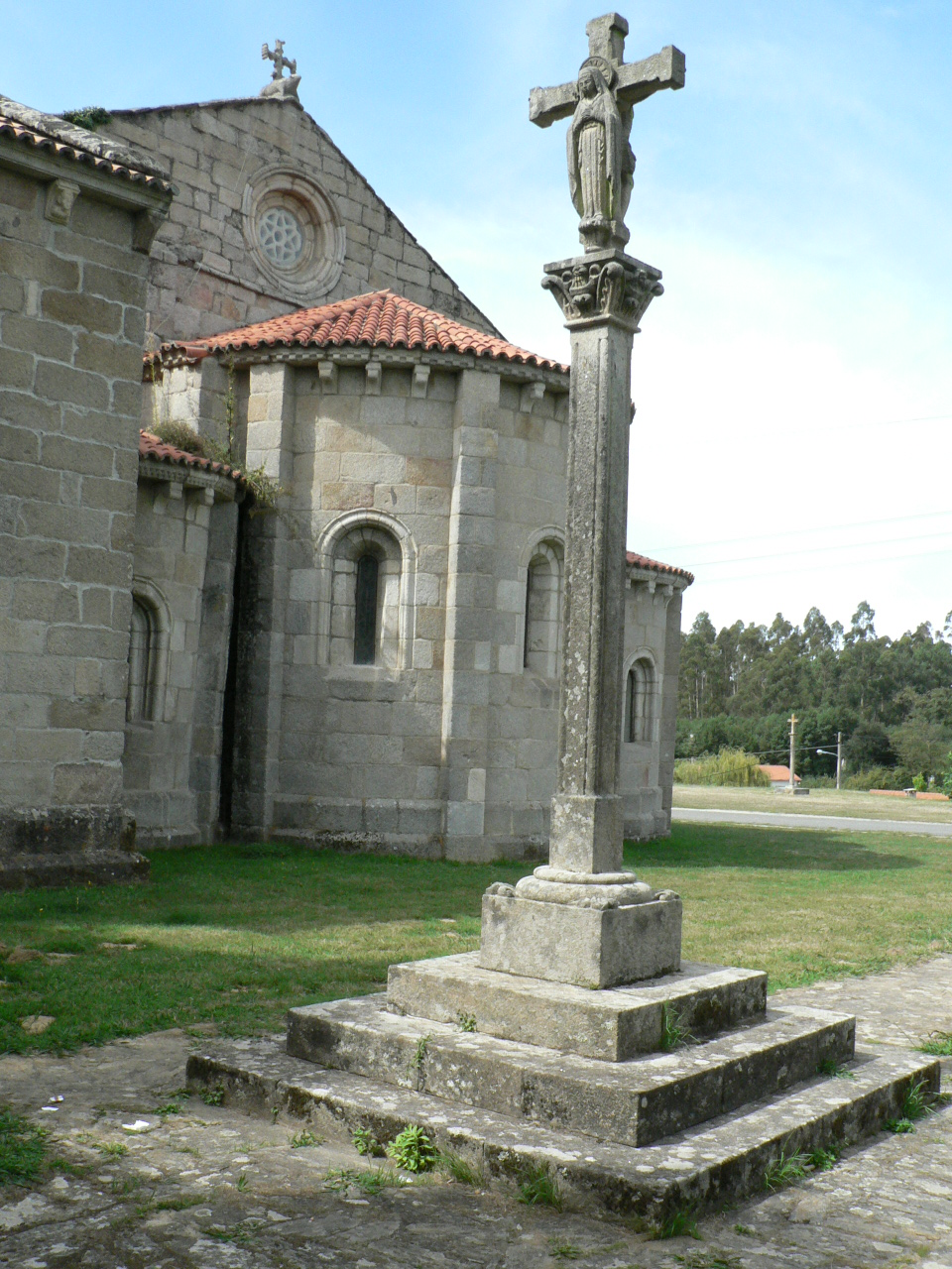 Bergondo, arquitectura relixiosa Categoría:Imaxes de Bergondo Categoría:Imaxes de cruceiros de Galicia